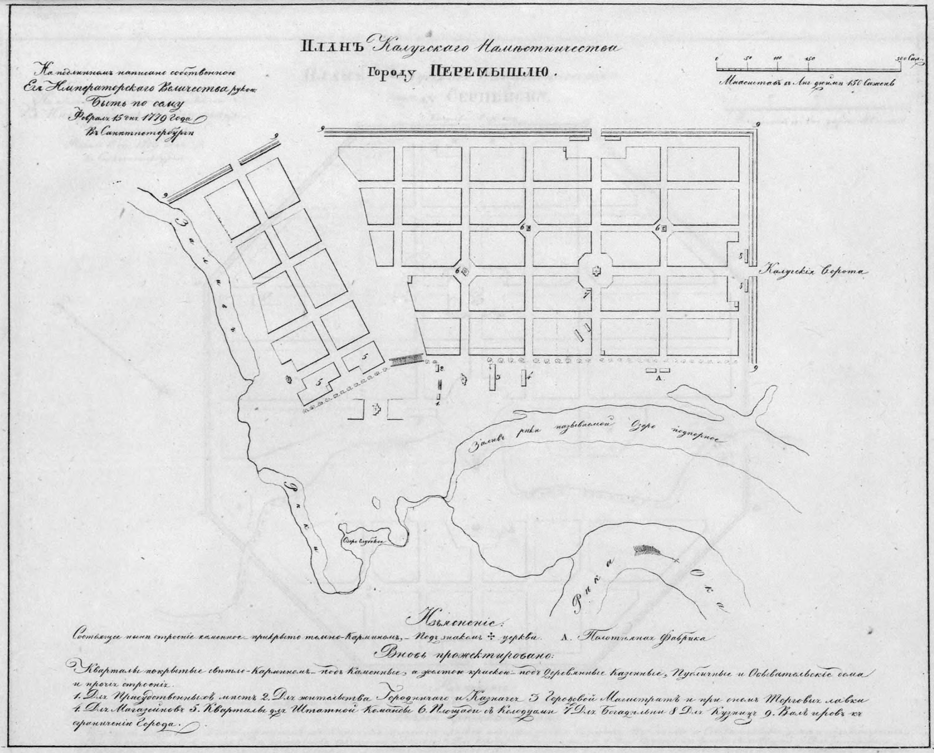 Полное Собрание Законов Российской Империи. Собрание первое. Книга чертежей и рисунков. (Планы городов).; 1839, Санктпетербургъ, Въ Типографіи II Отделенія Собственной Е. И. В. Канцеляріи.